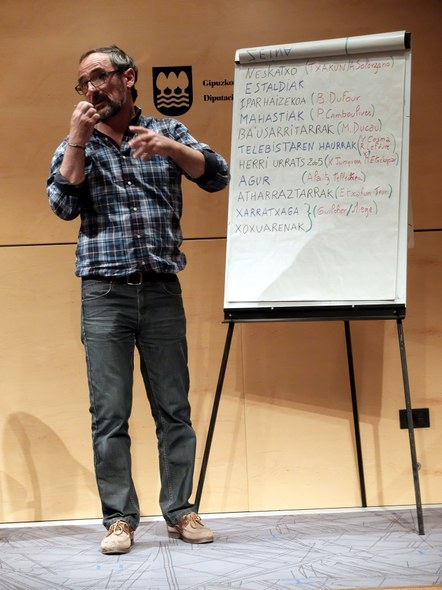 Patxi Perez dantza dinamizatzailea hitzaldi bat ematen. Dantzan Ikasi, 2017-03-31. Argazkia: Josu Garate - dantzan